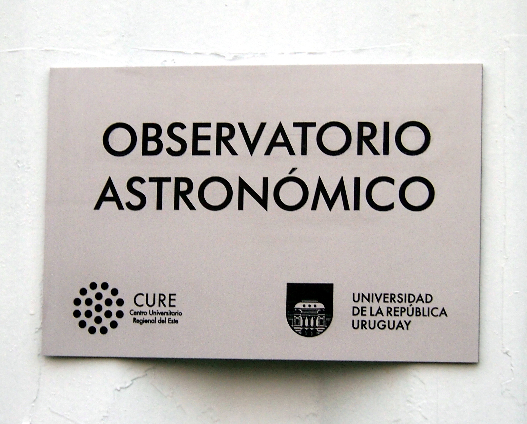 Logo del Observatorio del CURE